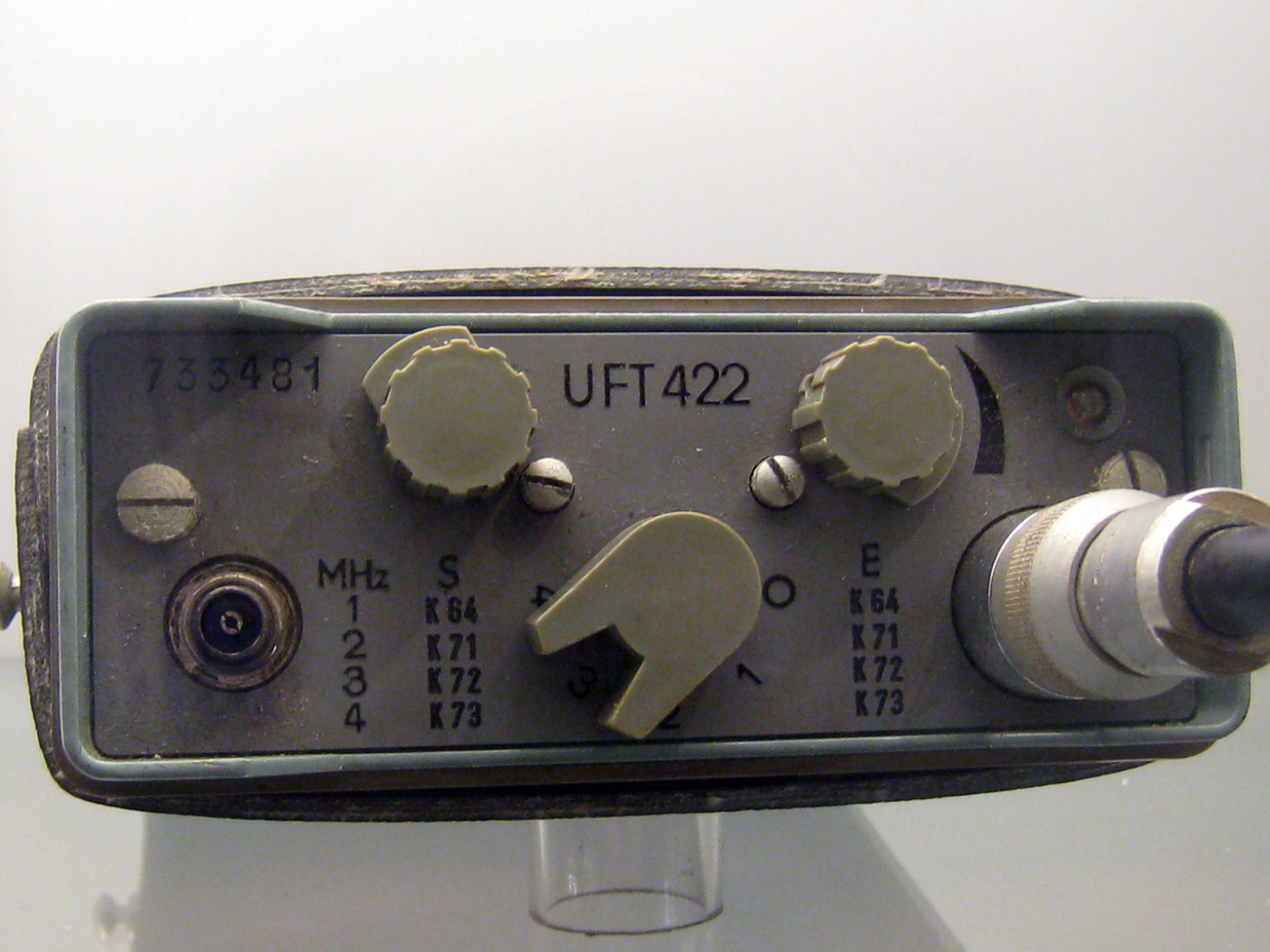 DDR-Funkgerät UFT 422 im Festungsmuseum Reuenthal